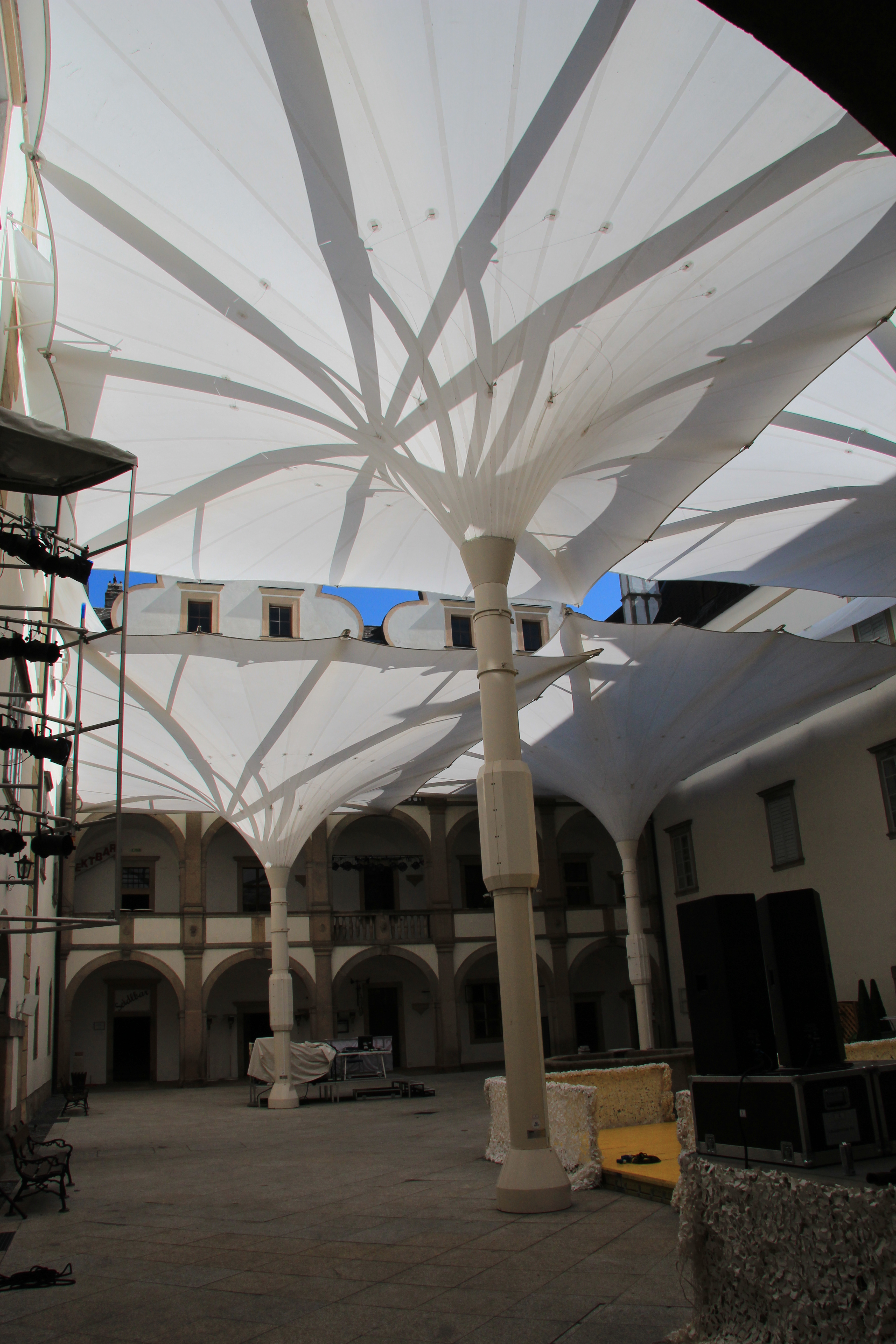 Schloss Weitra in Weitra, Waldviertel, Niederösterreich